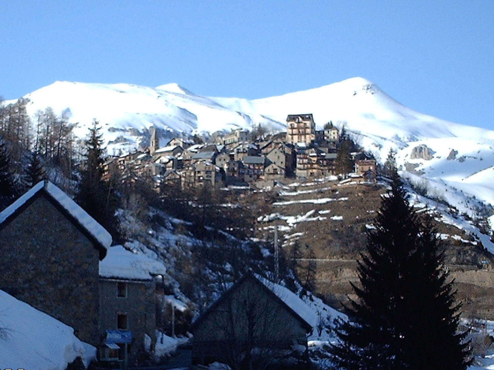 Du sud du village de Beuil (06 - FRANCE), vue sur le massif du Mont-Mounier (2817 m)